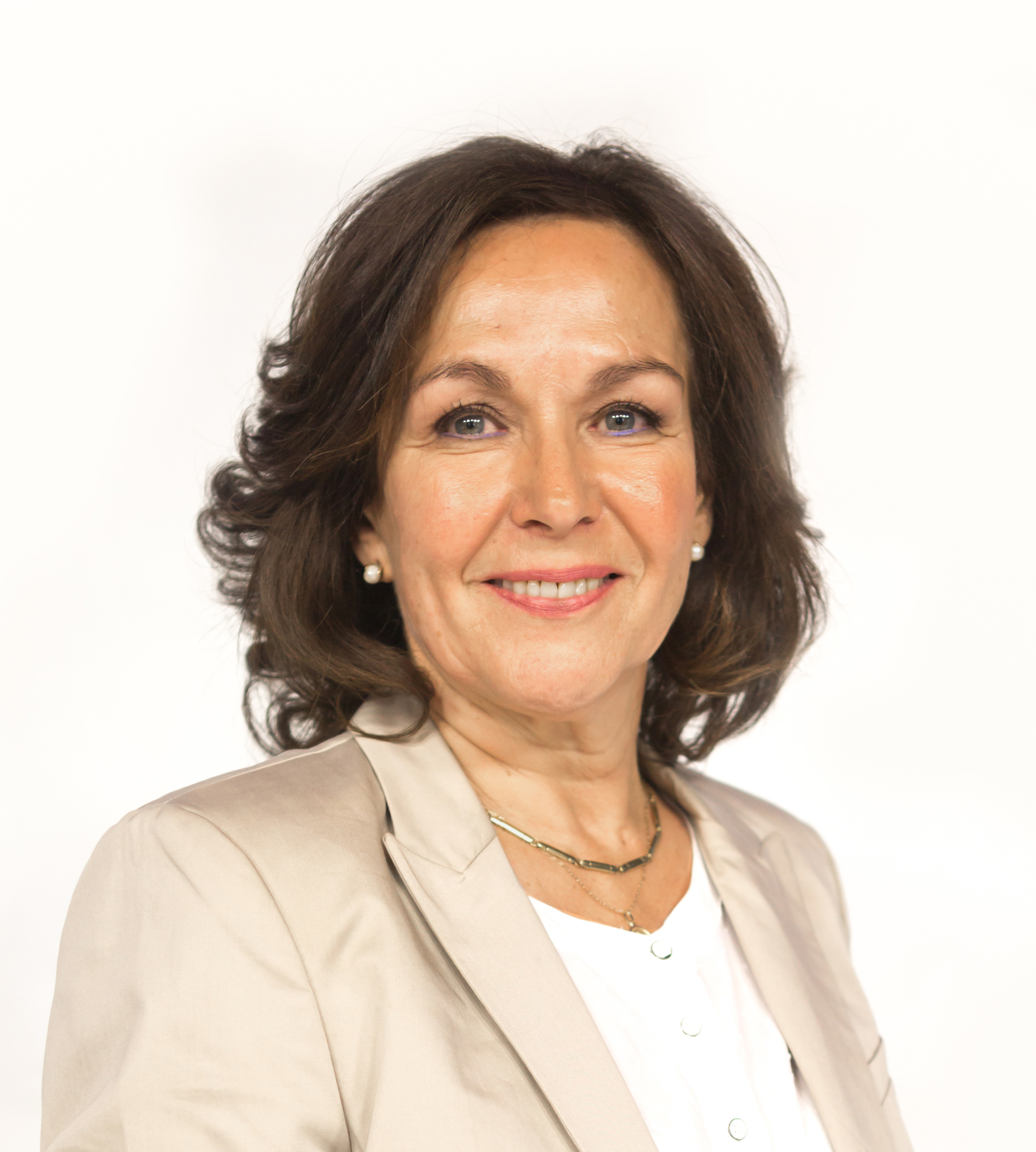 Alejandra Krauss, abogada y política chilena.